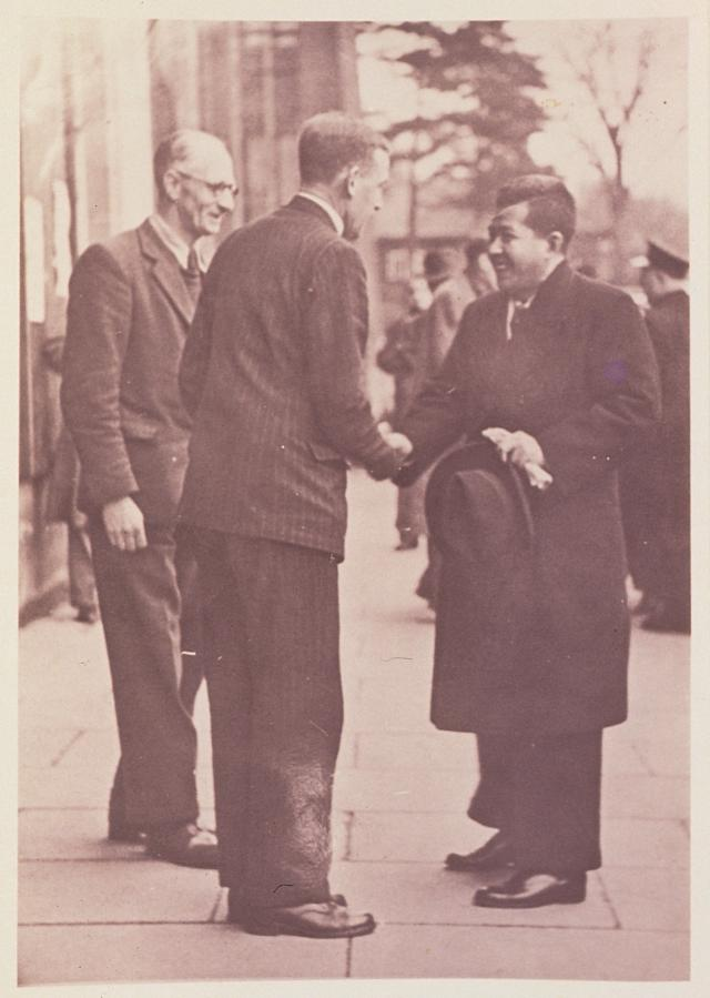 นายปรีดี พนมยงค์ ในกรุงลอนดอนขณะเตรียมเข้าเฝ้าพระเจ้าจอร์จที่ 6 พ.ศ. 2490